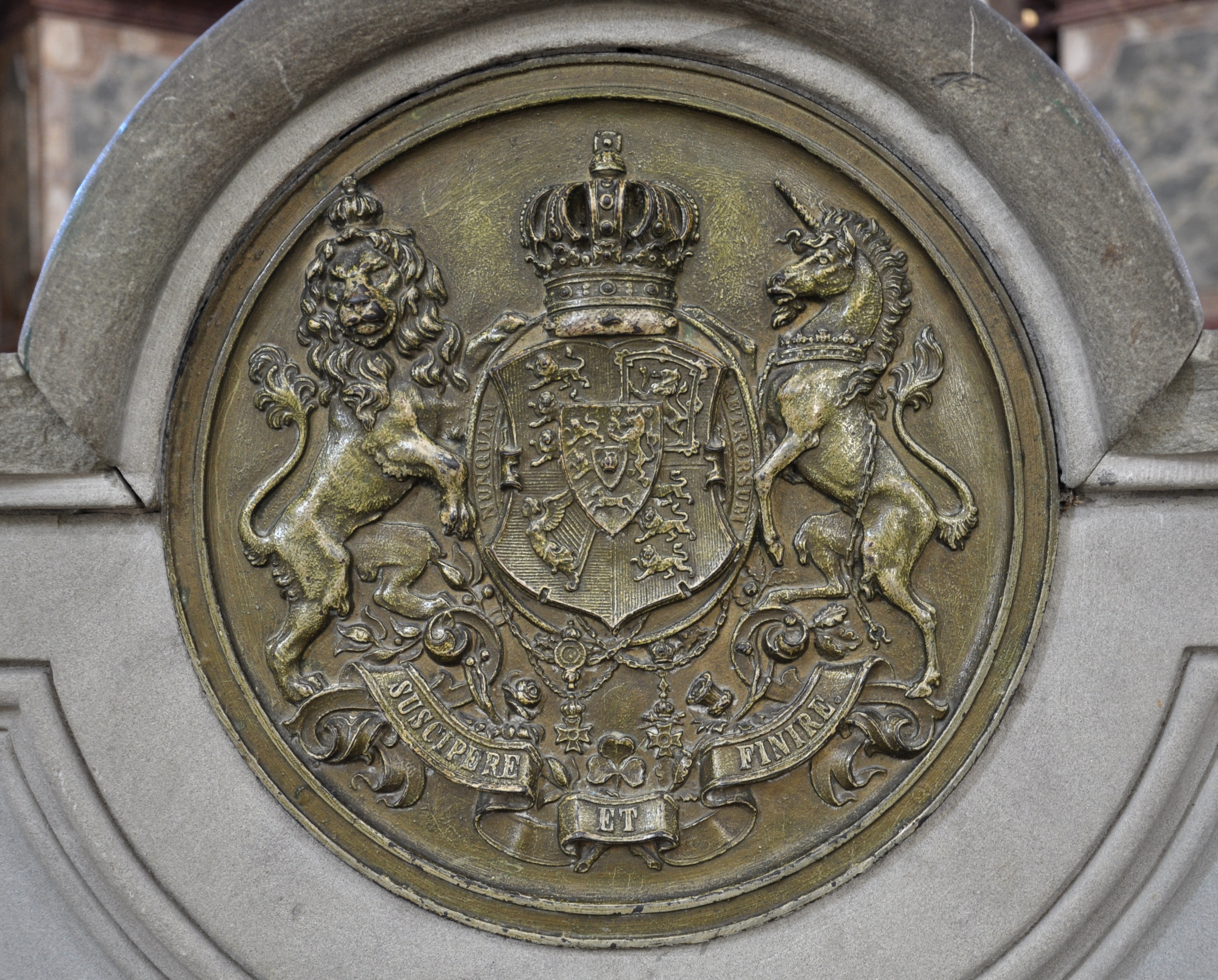 Weingarten (Württemberg), Basilika St. Martin und Oswald Balustrade am Eingang zur Welfengruft, Wappen des Georg V., König von Hannover (er ließ die Gruft renovieren)"suscipere et finire (lat.) = unternehmen und zu Ende führen"